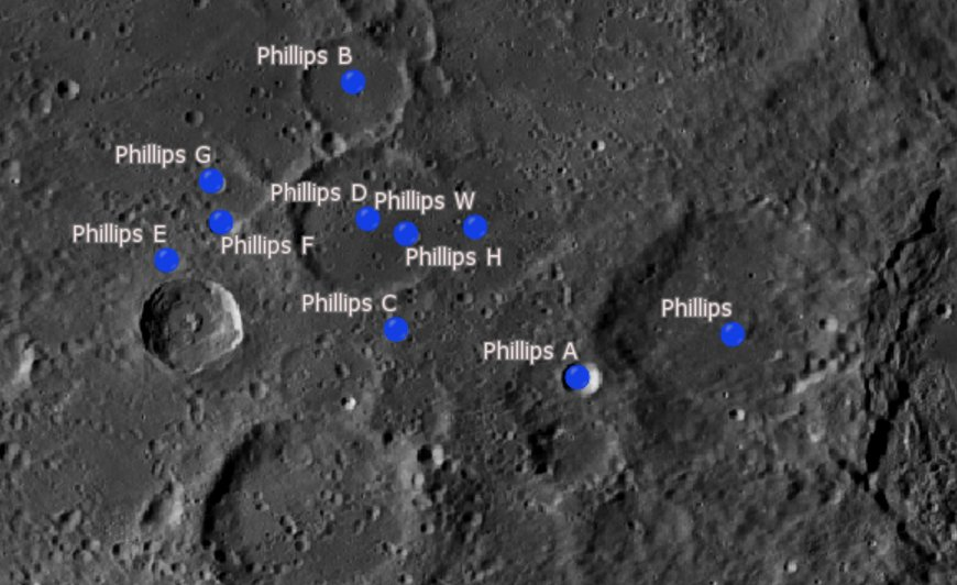 Cráter lunar Phillips. Cráteres satélite. (Imagen LRO)